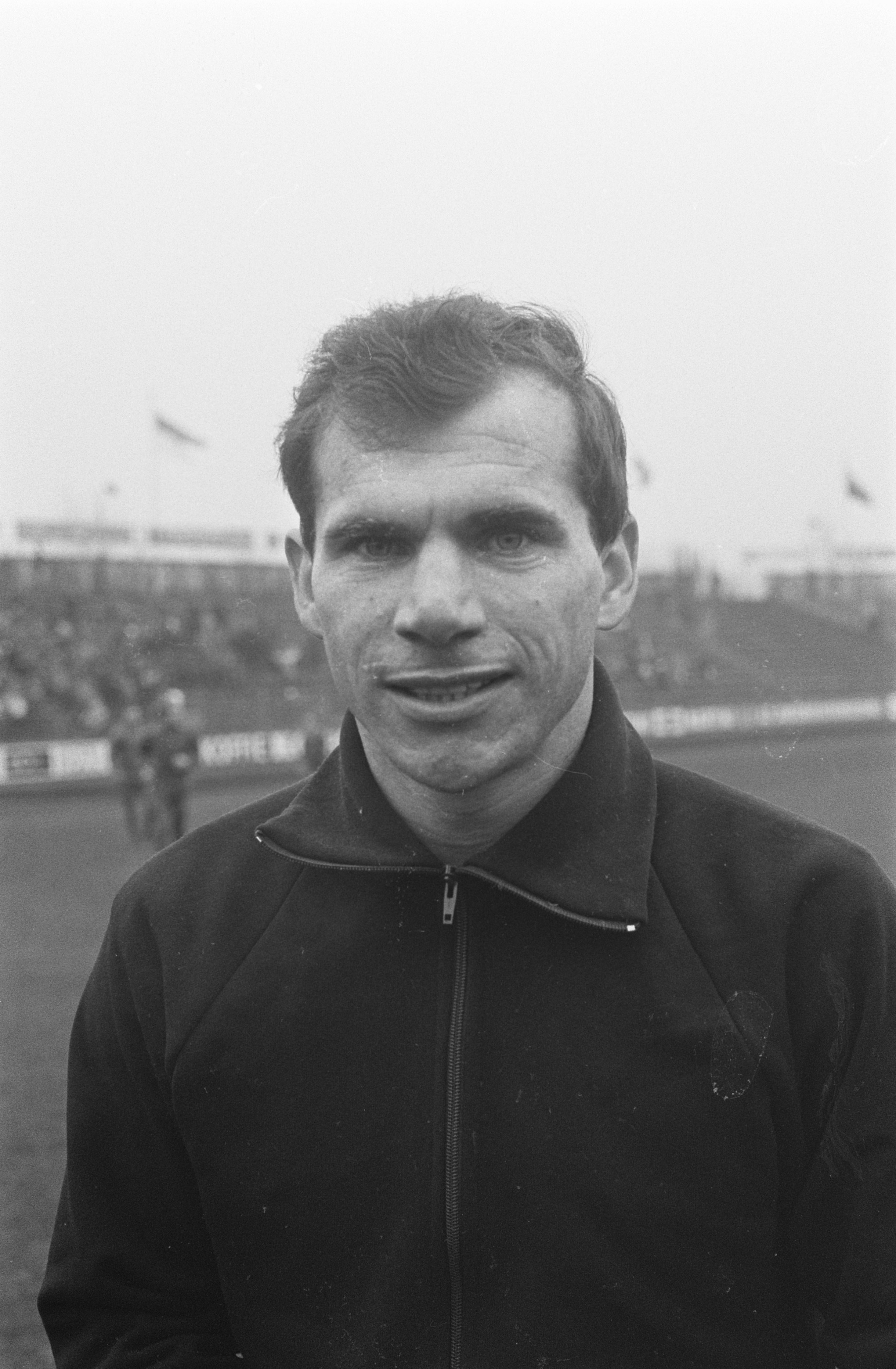 Den Bosch tegen Vitesse 1-1 De Vries (Vitesse), kop